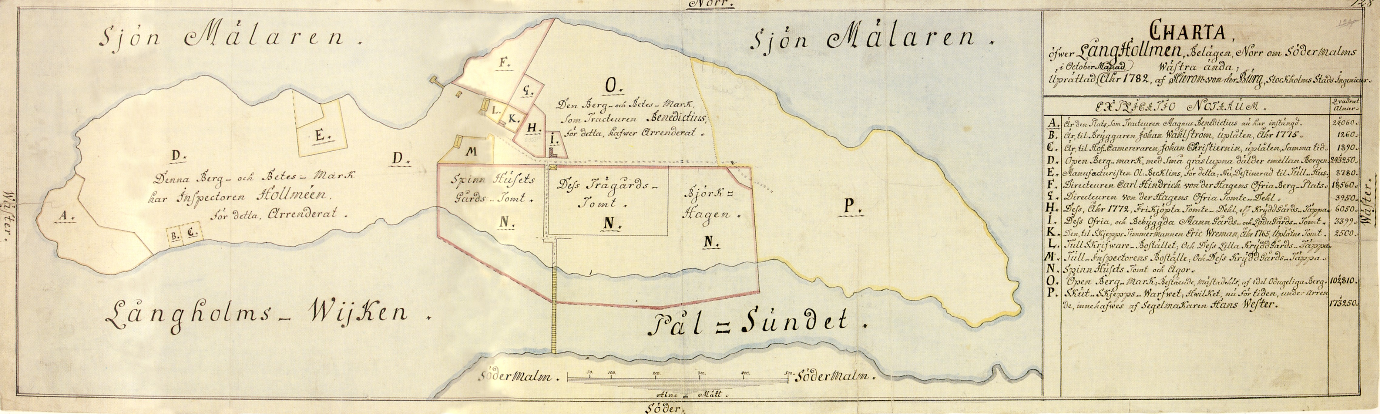 "Charta öfwer LångHollmen"